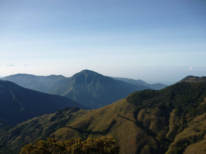 Cerros de la Candelaria, vista desde el Cerro Dragón, Acosta, Costa Rica.